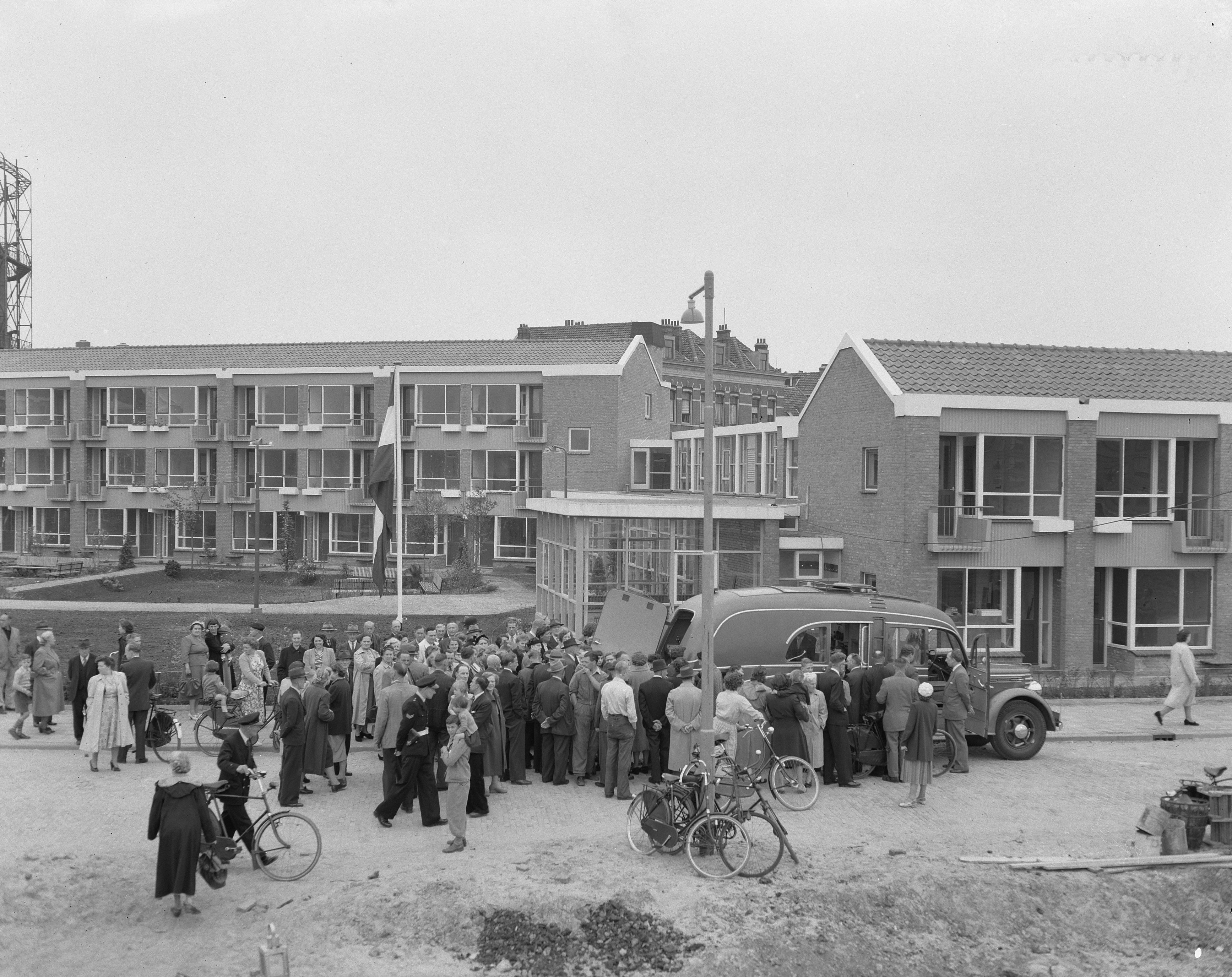 Collectie / Archief : Fotocollectie Anefo Reportage / Serie : Opbouwdag Rotterdam 1953 Beschrijving : Hofje "Gerrit de Koker" dat opnieuw in gebruik is genomen Datum : 18 mei 1953 Locatie : Rotterdam, Zuid-Holland Trefwoorden : gebouwen, hofjes, wederopbouw Fotograaf : Duinen, […] van / Anefo Auteursrechthebbende : Nationaal Archief Materiaalsoort : Negatief (zwart/wit) Nummer archiefinventaris : bekijk toegang 2.24.01.04 Bestanddeelnummer : 905-7325